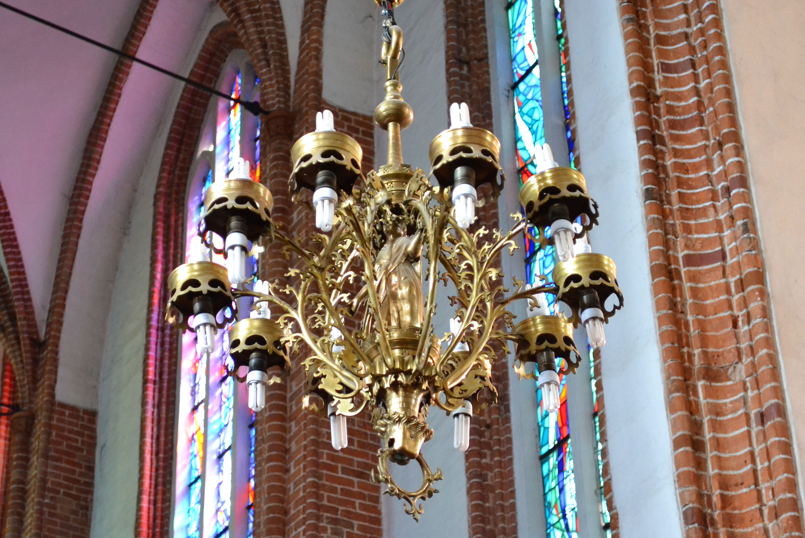 Żyrandol "Korona Holkenów" w katedrze w Kołobrzegu